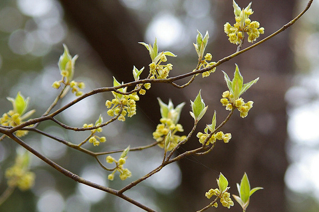 クロモジ（三重県尾鷲市） Lindera umbellata (Owase, Mie, JAPAN)